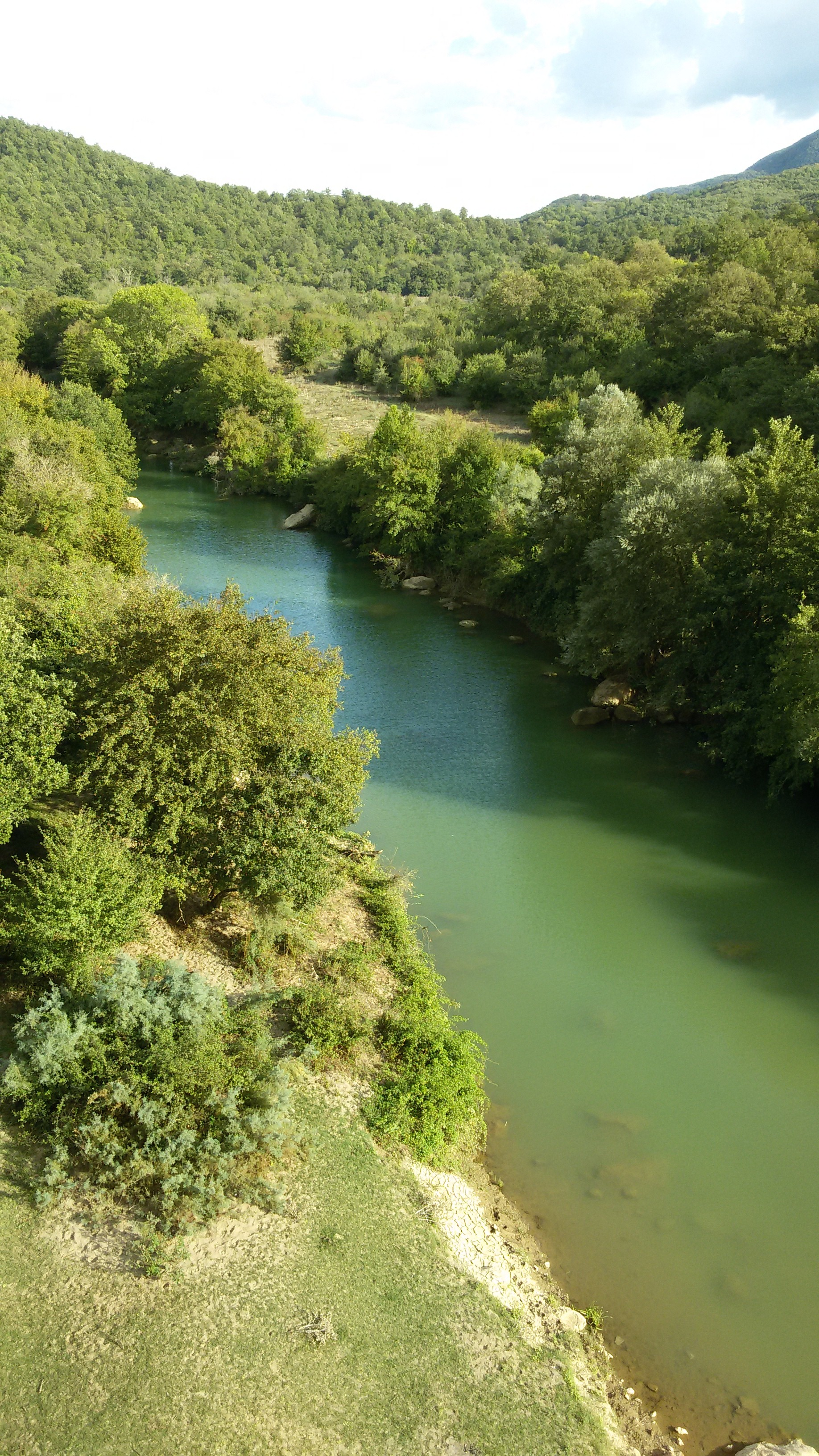 Fiume Mignoe presso Luni